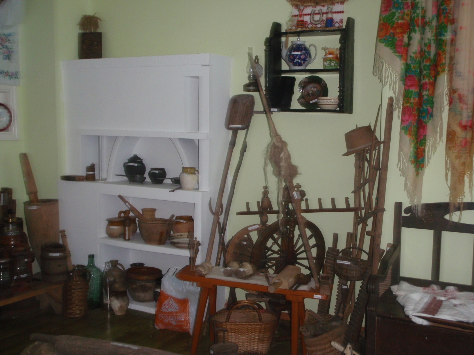 Експонати Новоселицького музею